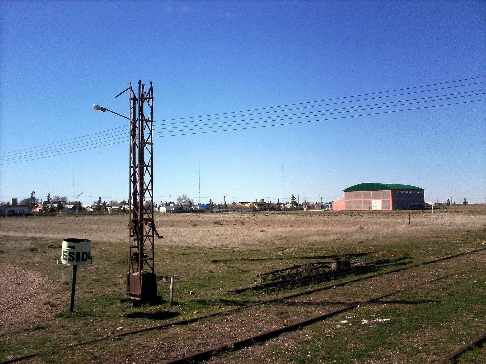 SEÑAL FERROVIARIA ROTA, DETRAS EL POBLADO DE FITZ ROY